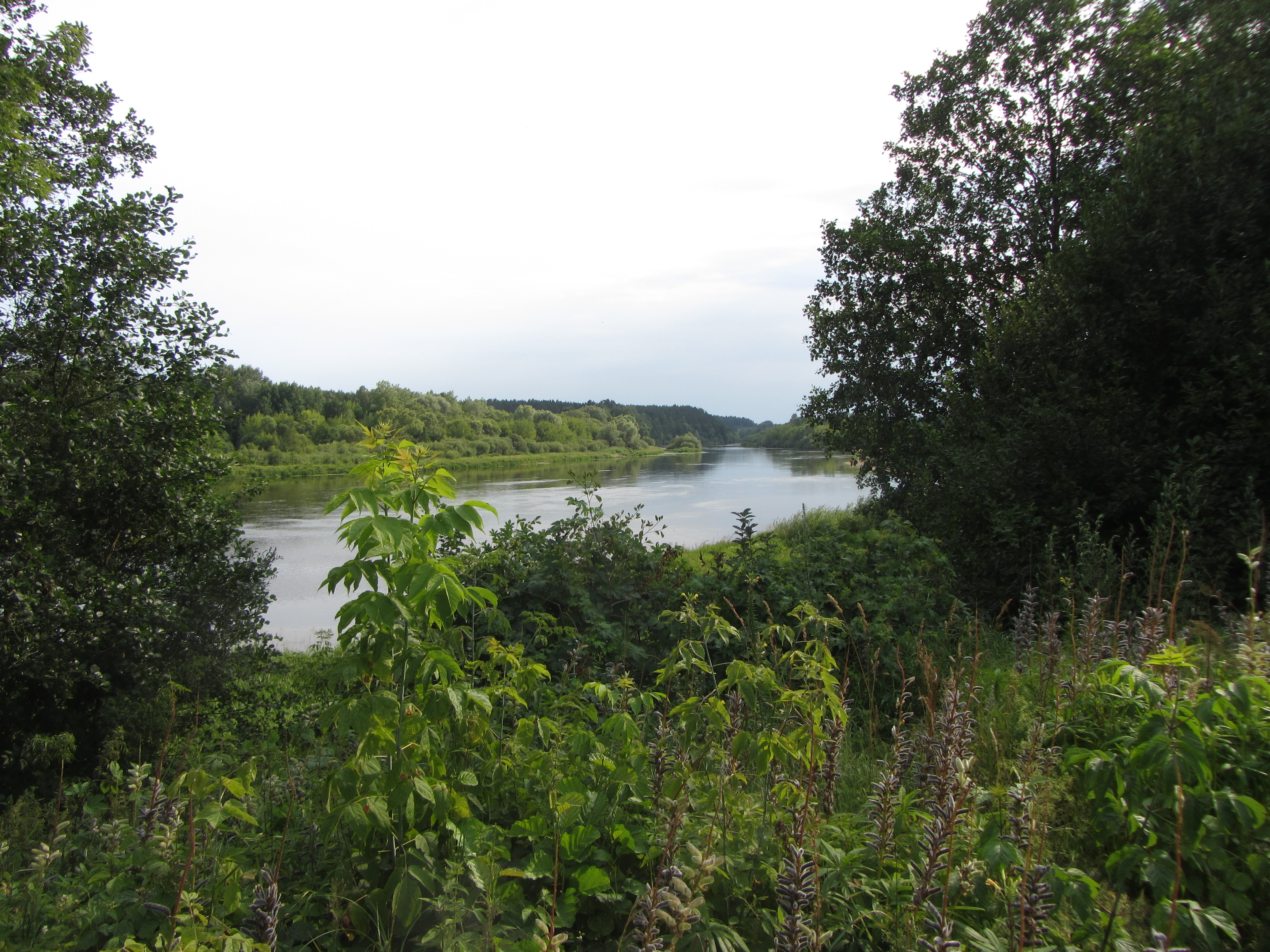 Kapčiamiesčio sen., Lithuania